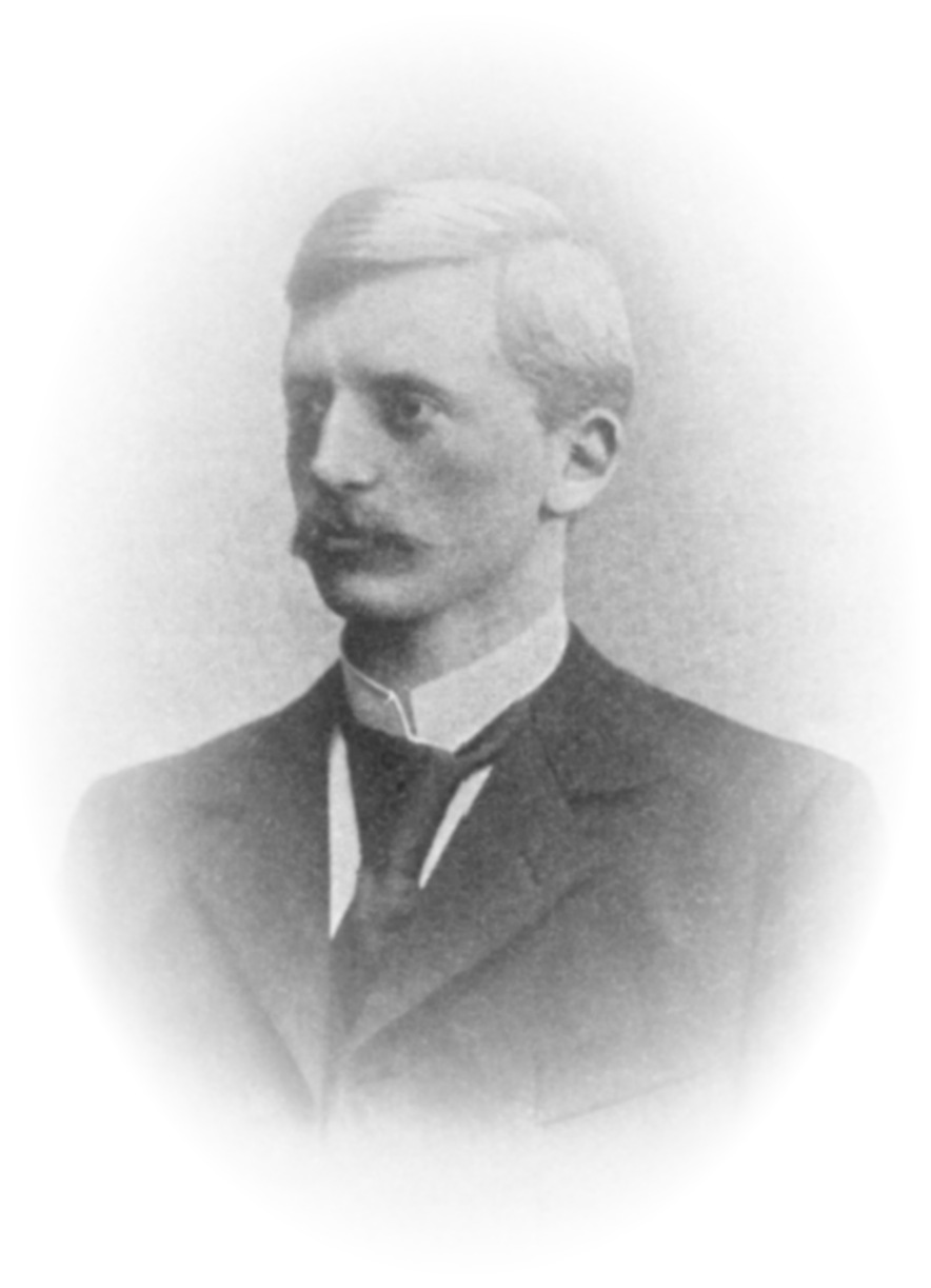 Description